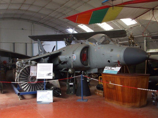 Jet at Flixton air museum